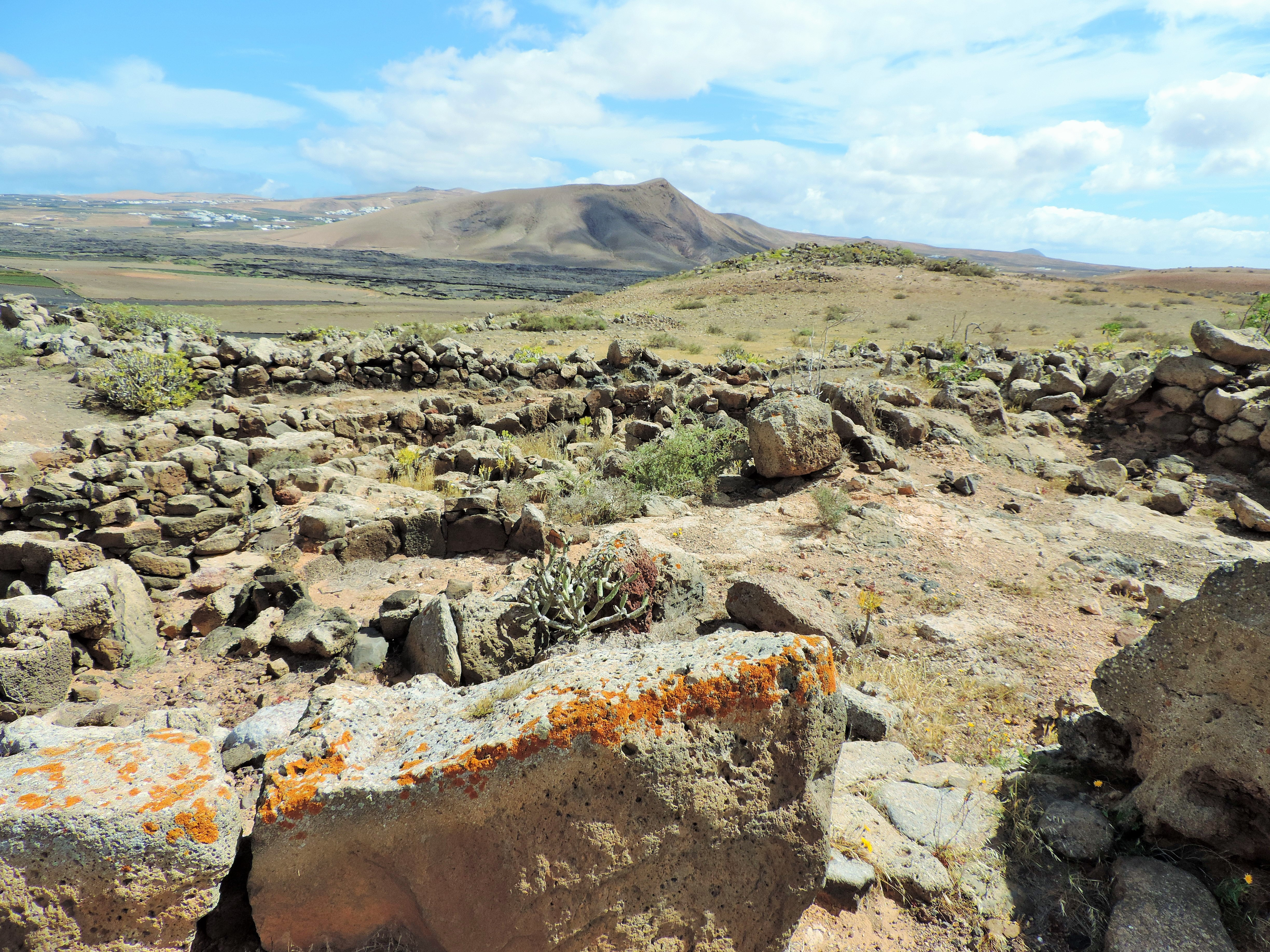 Yacimiento Arqueológico de Zonzamas con queseras y construcciones ciclópeas